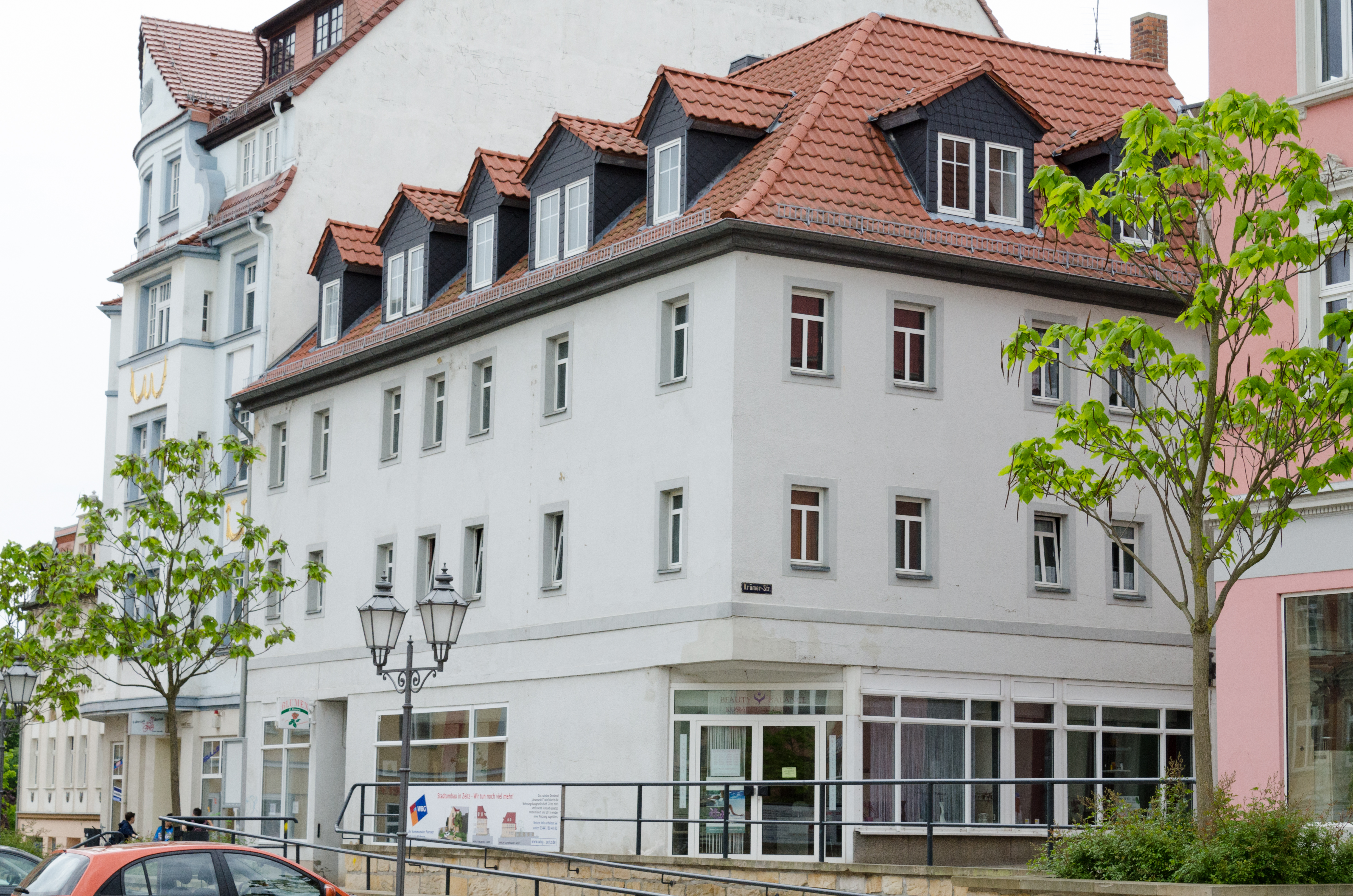 Zeitz, Neumarkt 9